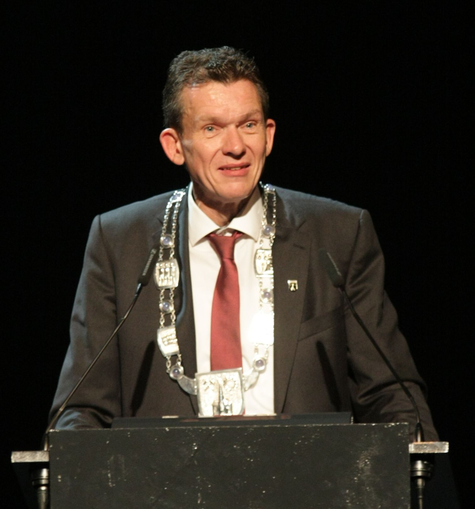 Oberbürgermeister des. Jörg Aumann während seiner Antrittsrede anlässlich der Amtsübergabe am 30.09.2019 in der Neuen Gebläsehalle Neunkirchen